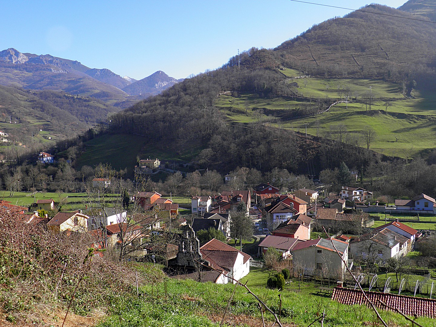 Vista general de Cuérigo, Aller, Asturias